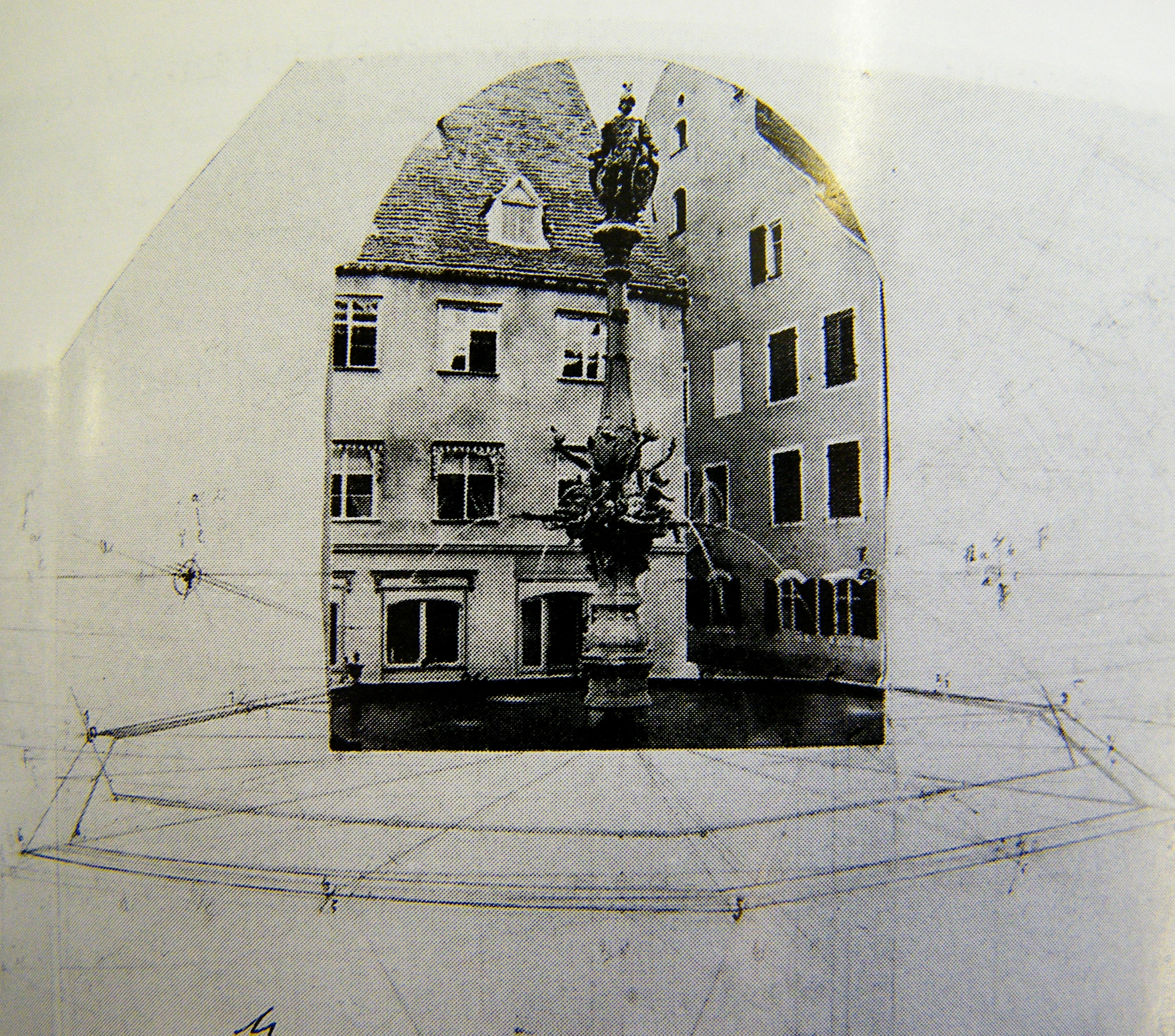 Rathausbrunnenmännchen mit der abgerissenen Stern-Apotheke im Hintergrund